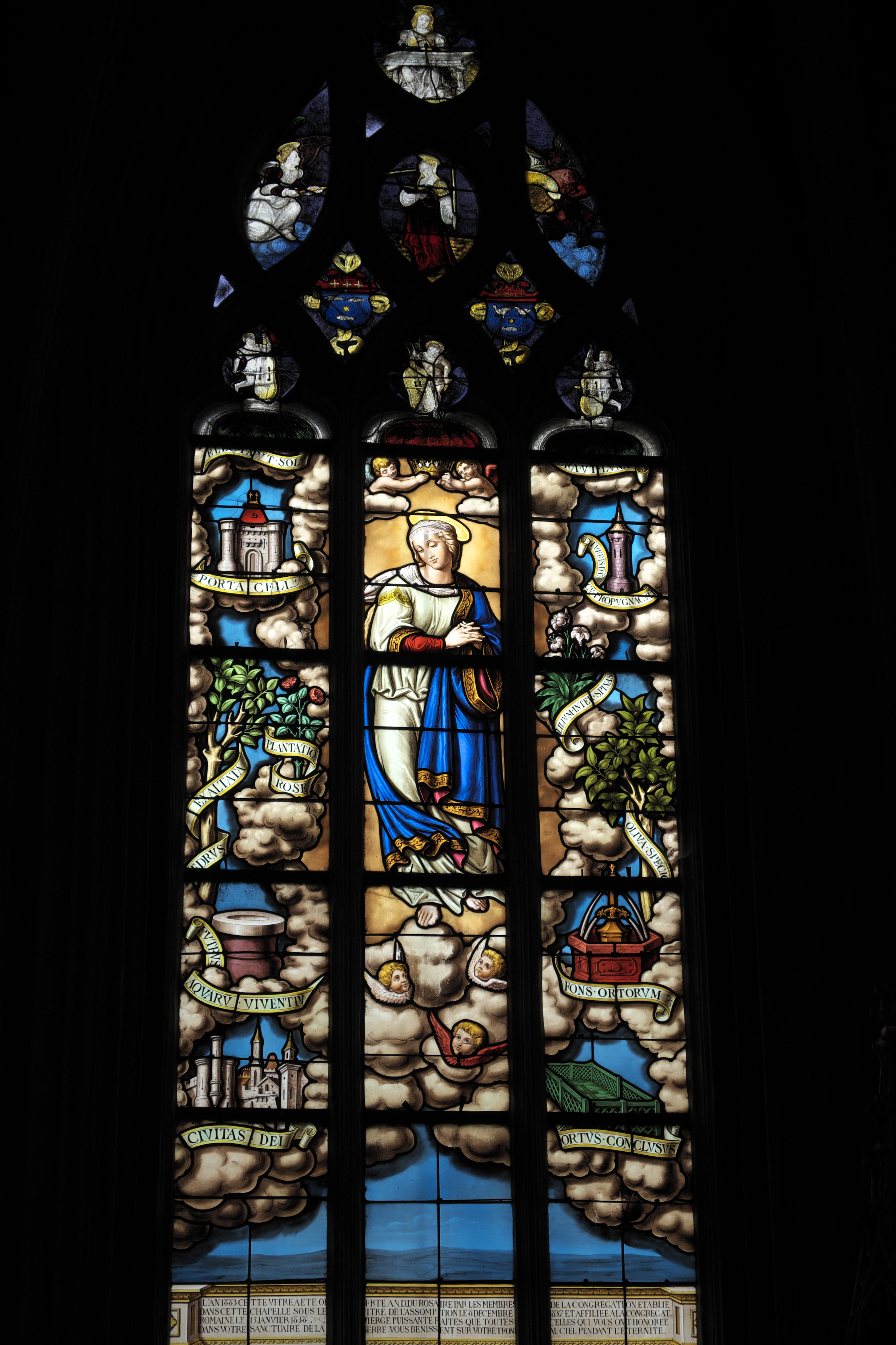 Katholische Pfarrkirche Notre-Dame-des-Marais in La Ferté-Bernard im Département Sarthe (Pays de la Loire/Frankreich), Bleiglasfenster (baie 1) mit Fragmenten um 1533 von François Delalande, Lanzetten von 1883, von Eugène und Ferdinand Hucher, aus der Glasmalereiwerkstatt der Karmeliten von Le Mans (Carmel du Mans), Signatur unten: HUCHER ET FILS; Darstellung: Maria Immaculata